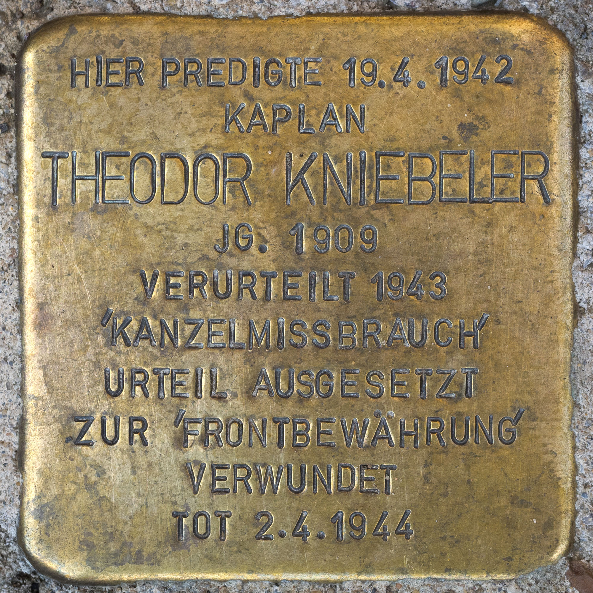 2016 Stolpersteine ToeVo Kniebeler Theodor